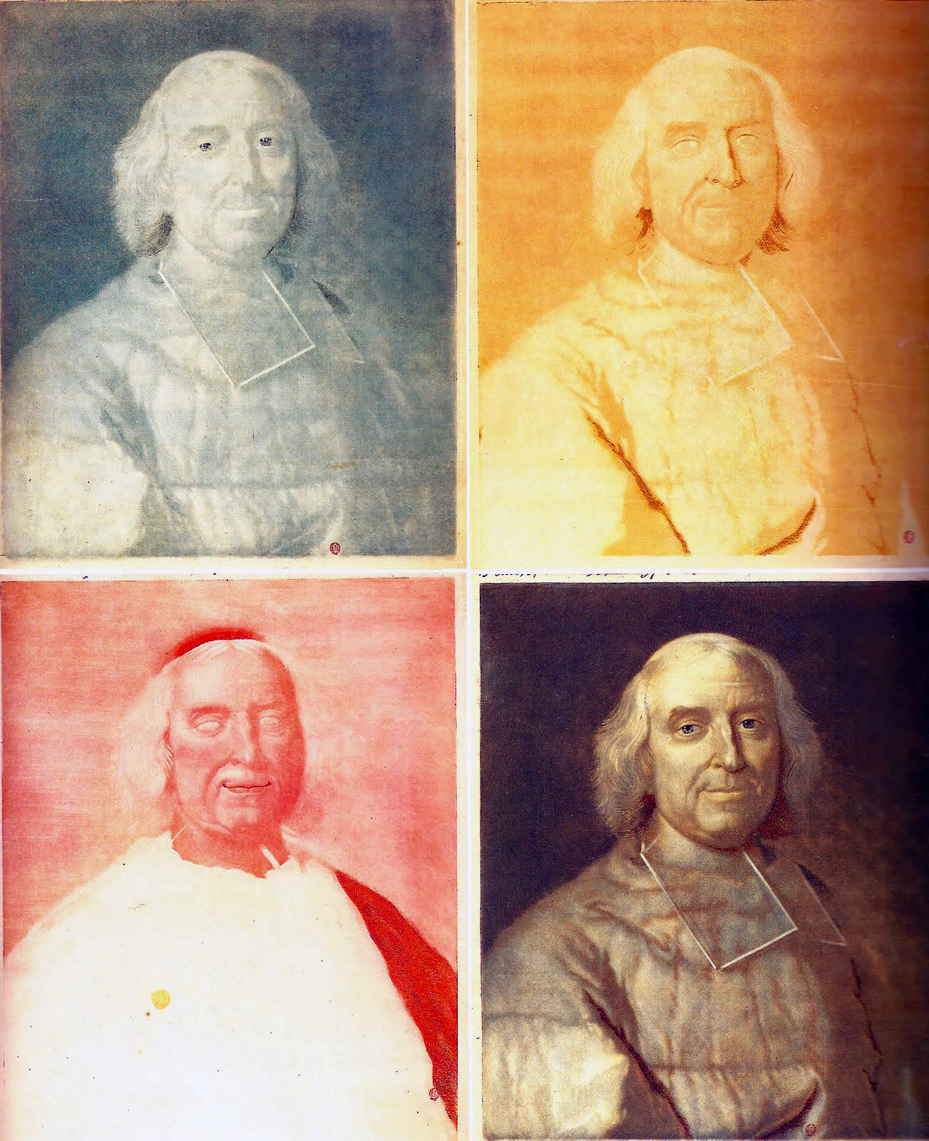 4 états ou épreuves intermédiaires (C, Y, M, B) pour une gravure en couleurs du cardinal Fleury par Jacob Christoph Le Blon d'après Hyacinthe Rigaud.